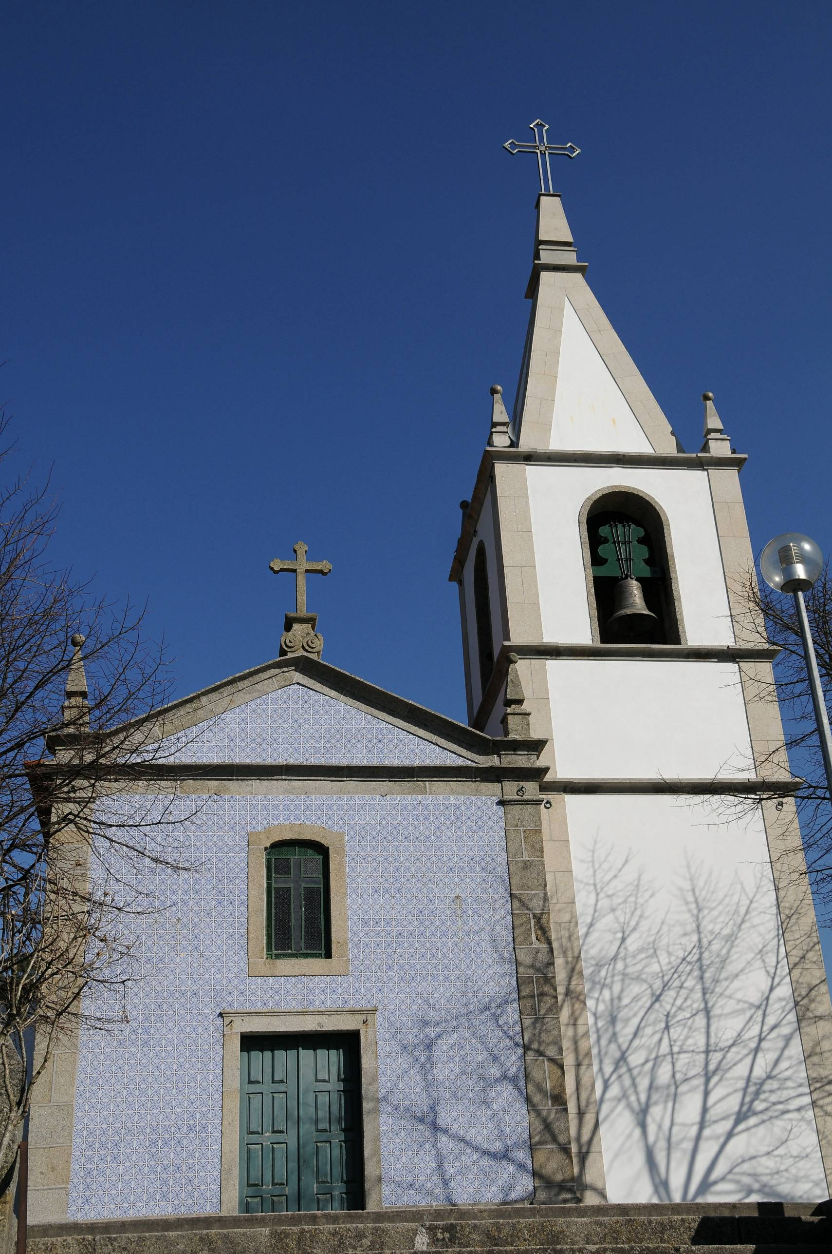 Portela Church, in Famalicao, Portugal